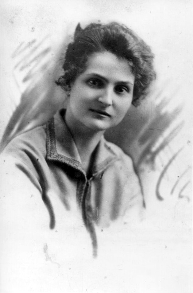 Маргарита Николаевна Арсеньева — вторая жена Владимира Клавдиевича Арсеньева